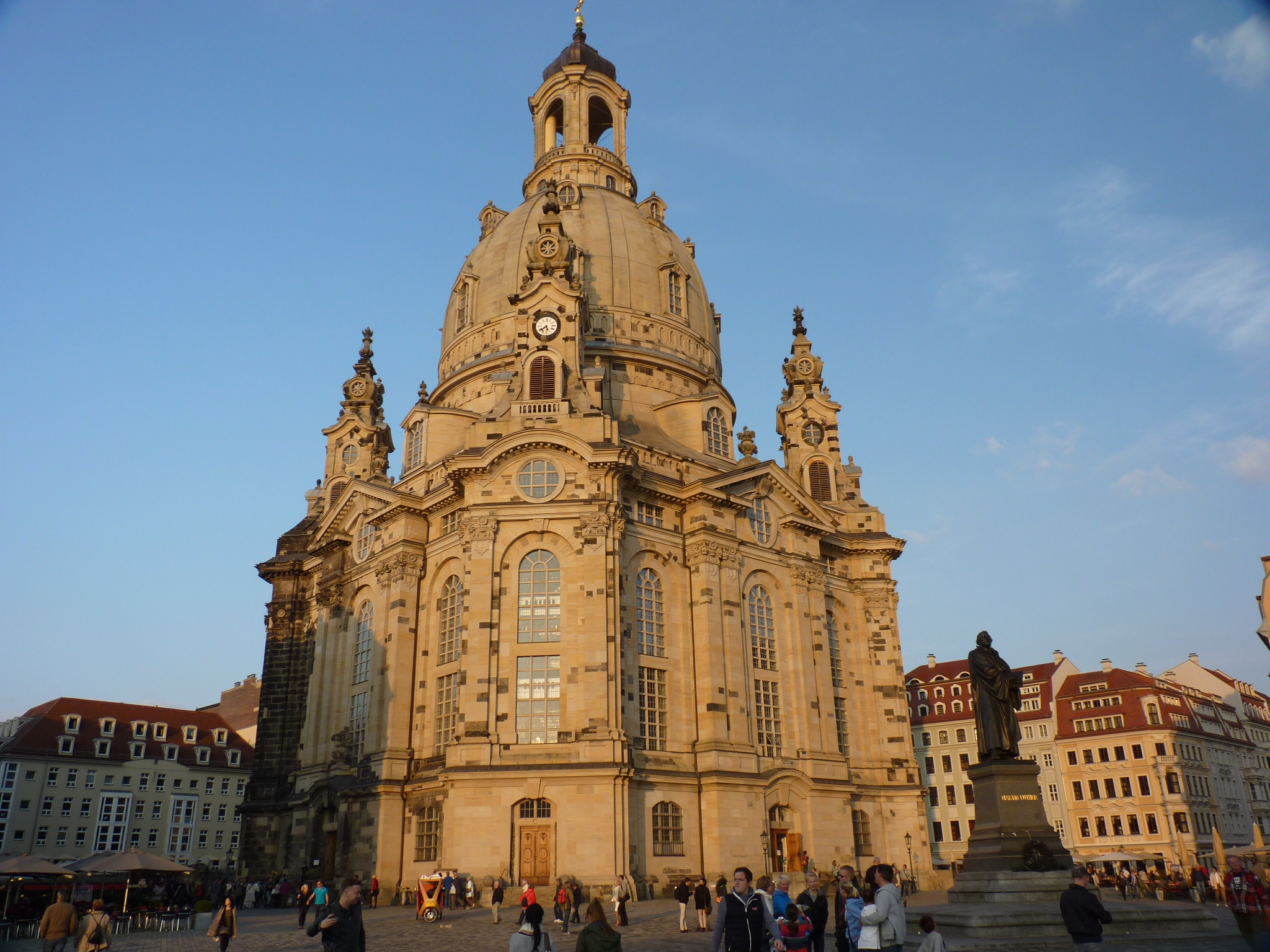 Die Frauenkirche in Dresden im Abendlicht